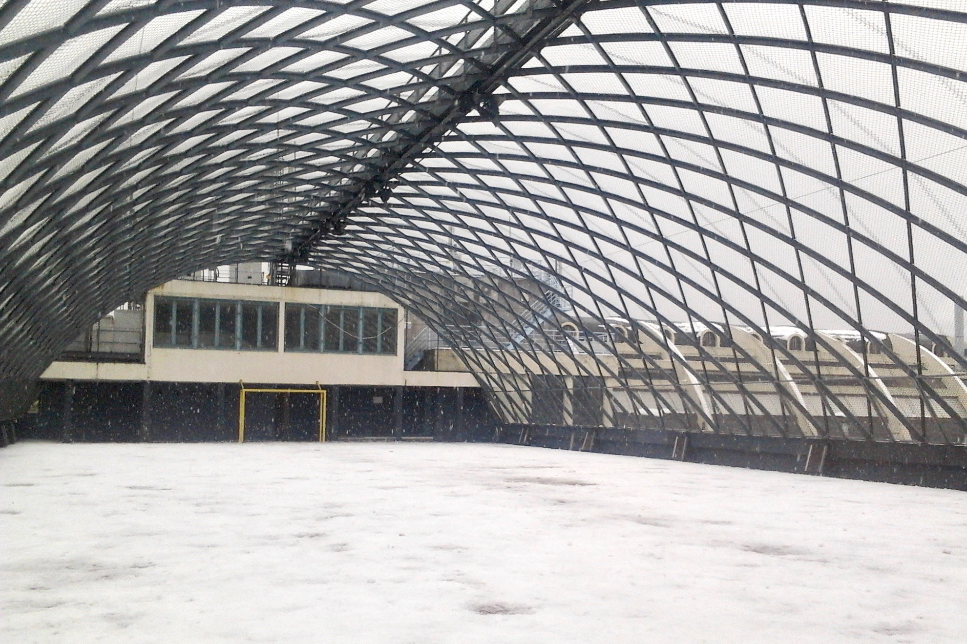 Cour de récréation du lycée Saint-Louis-de-Gonzague